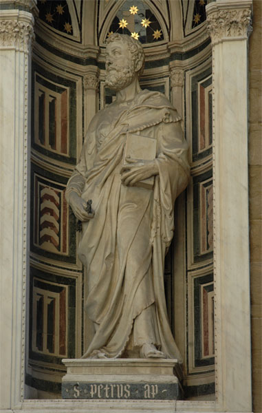 Imatge de Sant Pere. Atribuït a Donatello o bé a Ciuffagni. Orsanmichele, Florència